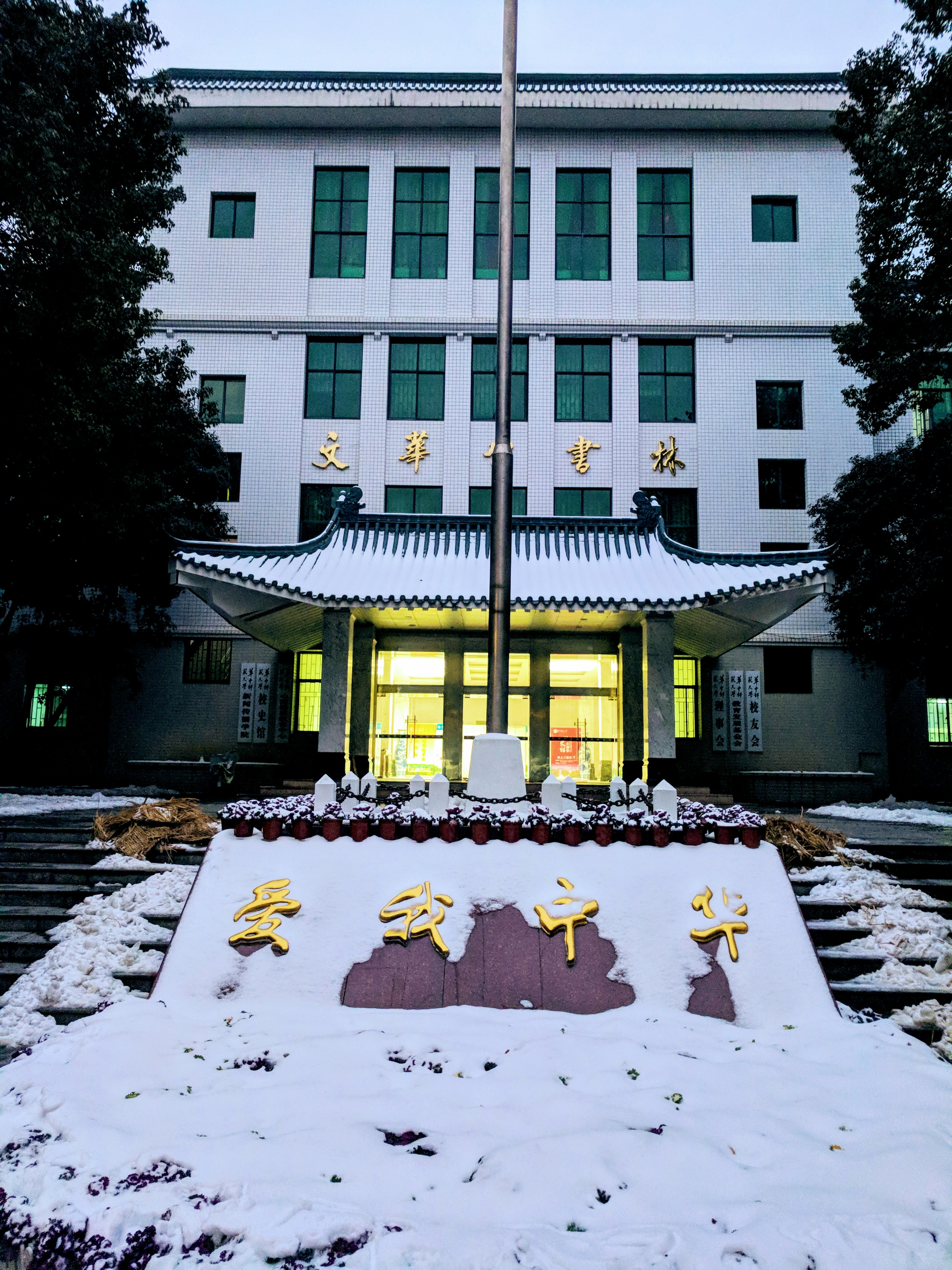 华中师范大学老图书馆，新馆落成后不再承担图书借阅职能，改制为校史馆、档案馆、新闻传播学院、学生心理咨询中心和学生事务大厅的办公地点，并复名「文华公书林」。